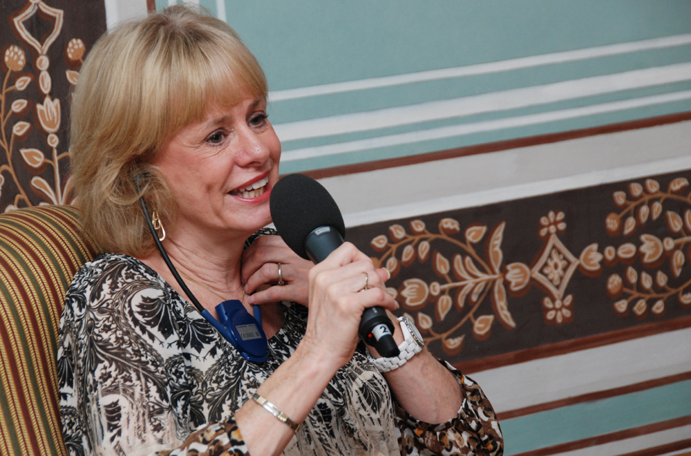 Kathy Reichs, americká spisovatelka a antropoložka, debatuje v Americkém centru s českými čtenáři, 22. října 2012.